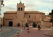 Bisimbre, en Zaragoza (España). Plaza de España con vista al Pilar y a la iglesia